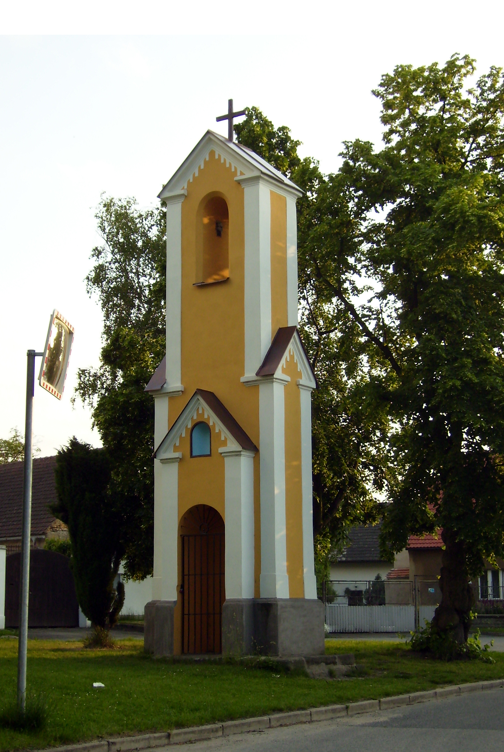 Česky: Kaplička v Šestajovicích, okres Praha-východ, ul. 9. května. - OpenStreetMap(Info)